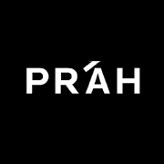 Logo nakladatelství Práh s.r.o.